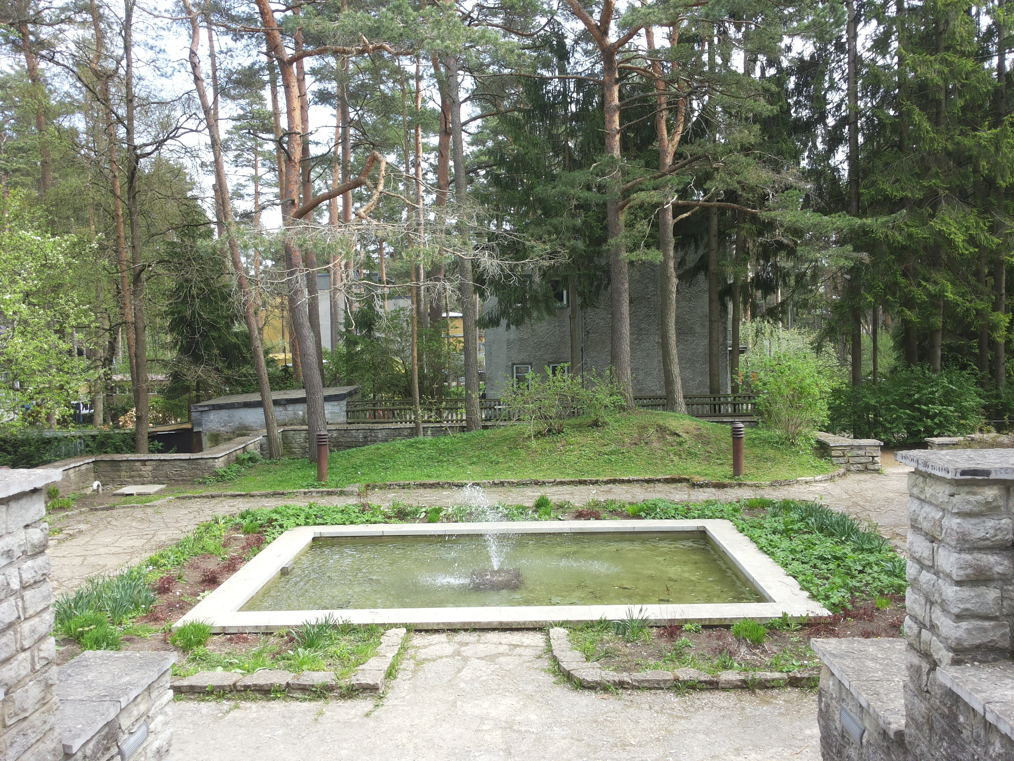 Ravila tänava park